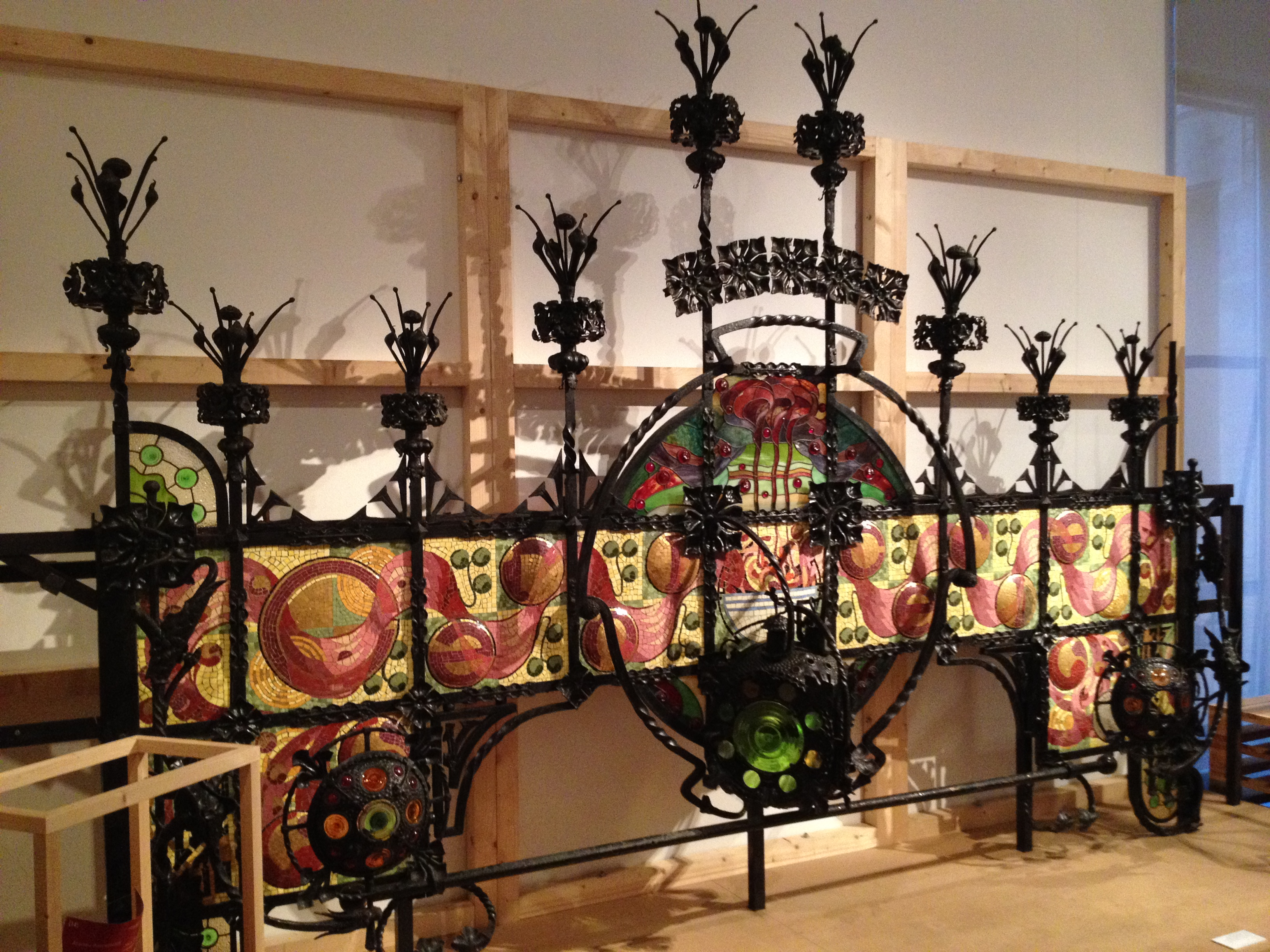 Parada de carn al Mercat de Sant Antoni. (Barcelona, Catalunya). Disseny d'Eduard Maria Balcells el 1909. Va guanyar el premi anual de l'Ajuntament de Barcelona. Un cop restaurada està al Museu d'Història de Barcelona